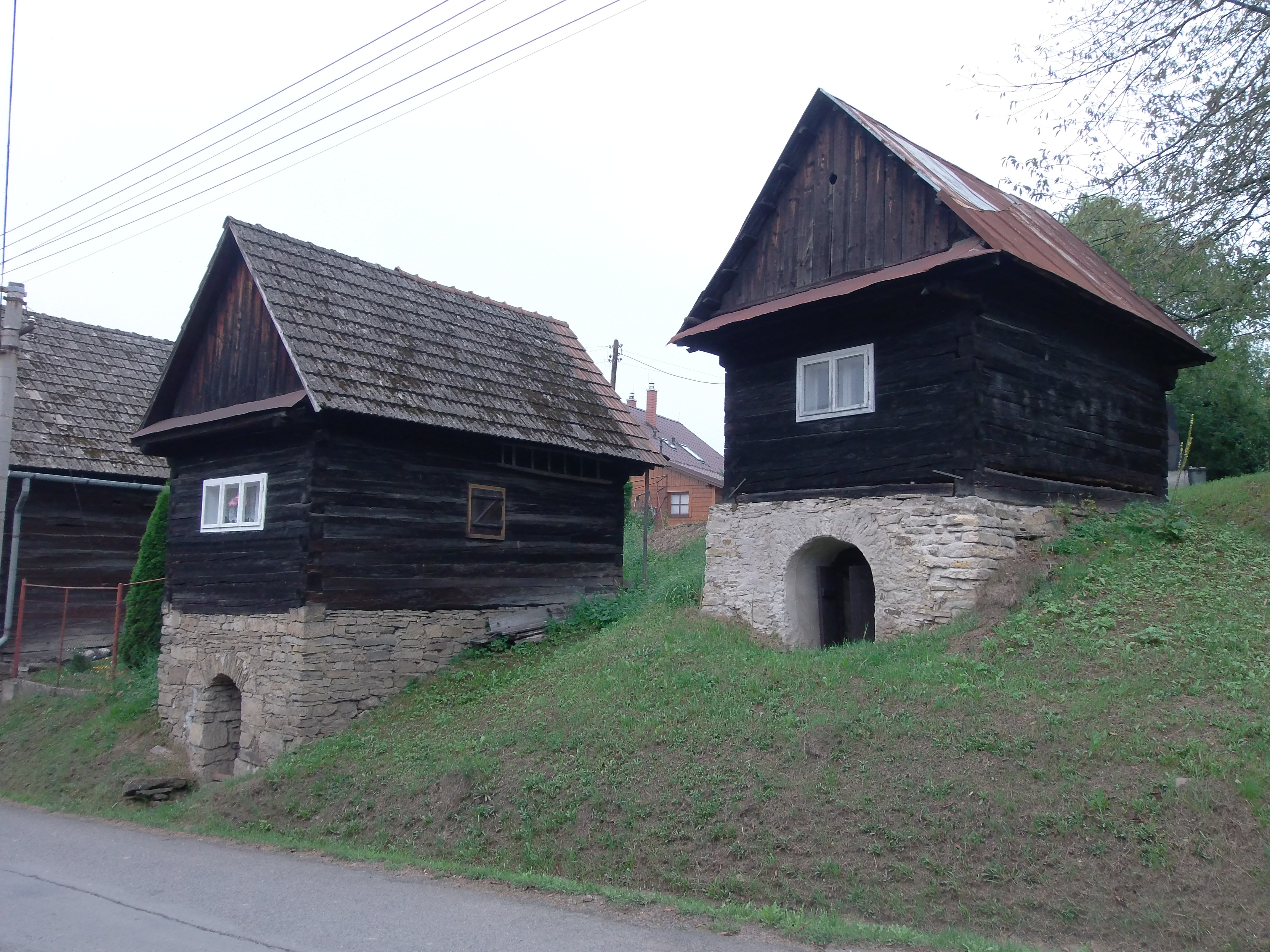 Vinné sklípky v Lužné u Vsetína.